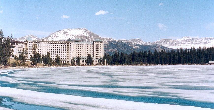 Copyright : Georgio Date : mai 2001 Sujet : Hotel Lac Louise, Alberta, Canada